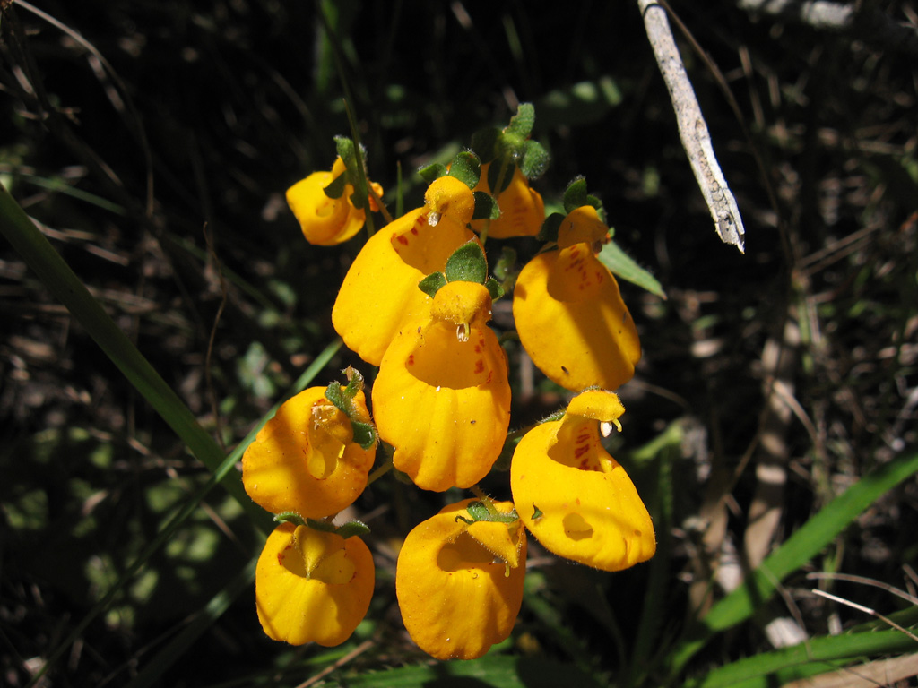 Nombre común: Capachito (Calceolaria corymbosa ssp. corymbosa)